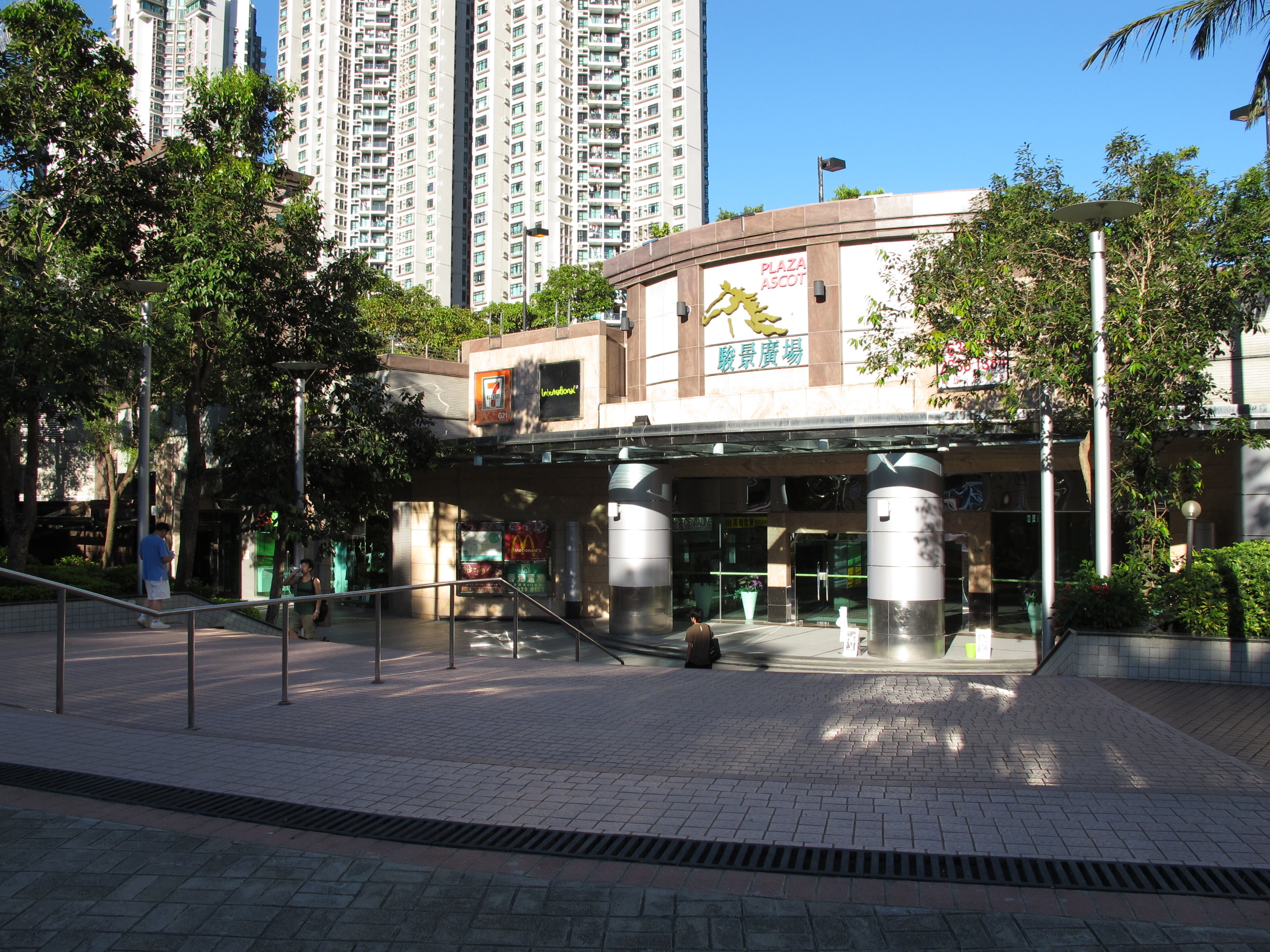 Plaza Ascot